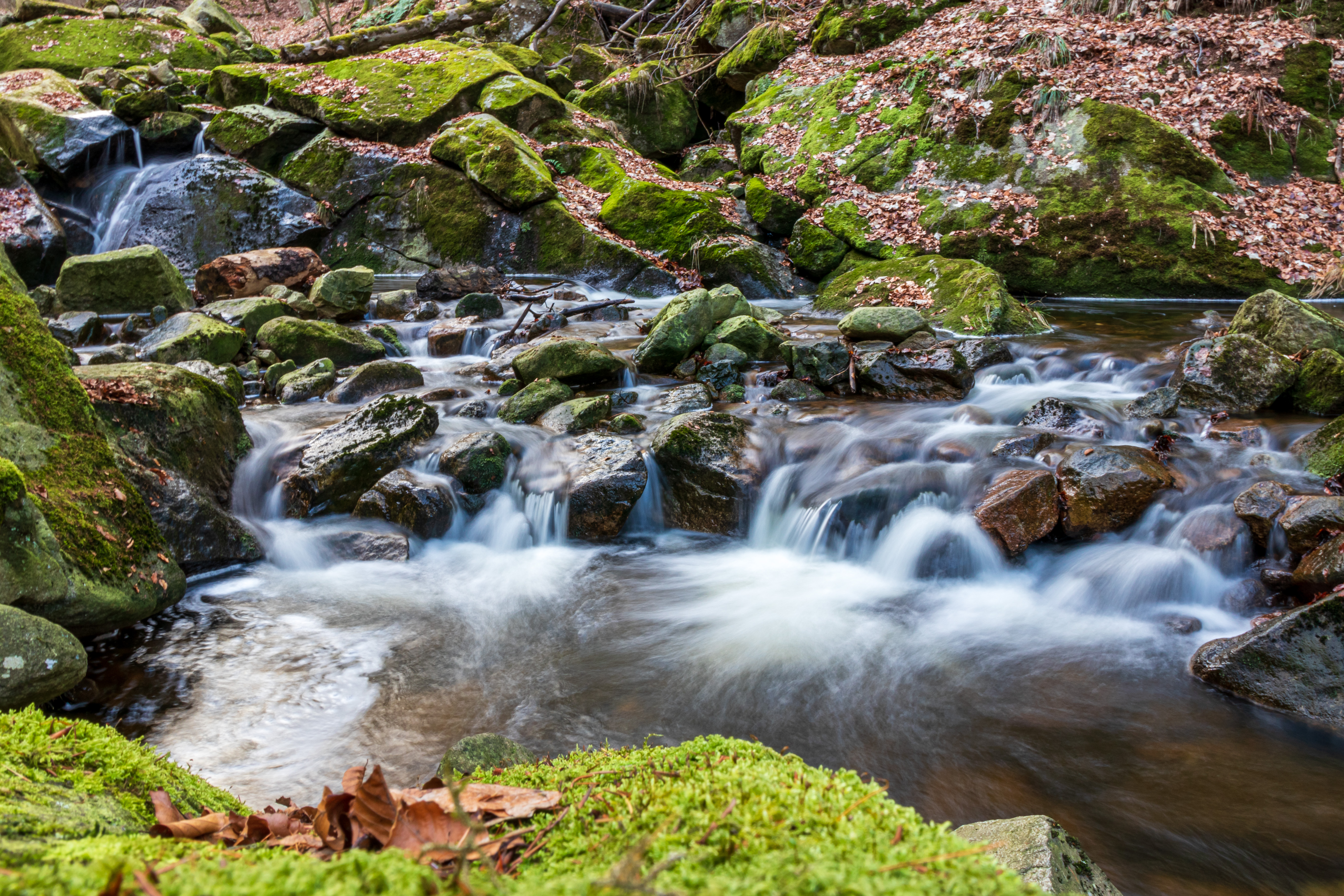 Die Ilse bei Ilsenburg im LSG Harz Und Nördliches Harzvorland